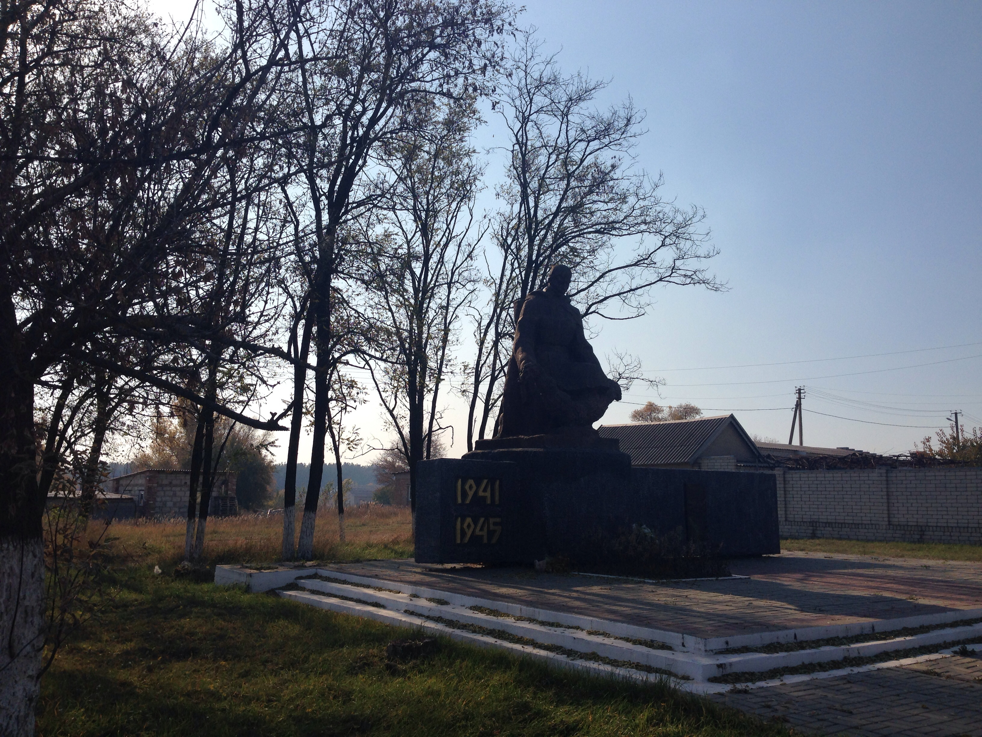 Братська могила радянських воїнів. Поховано 30 воїнів., Подвірки, біля траси